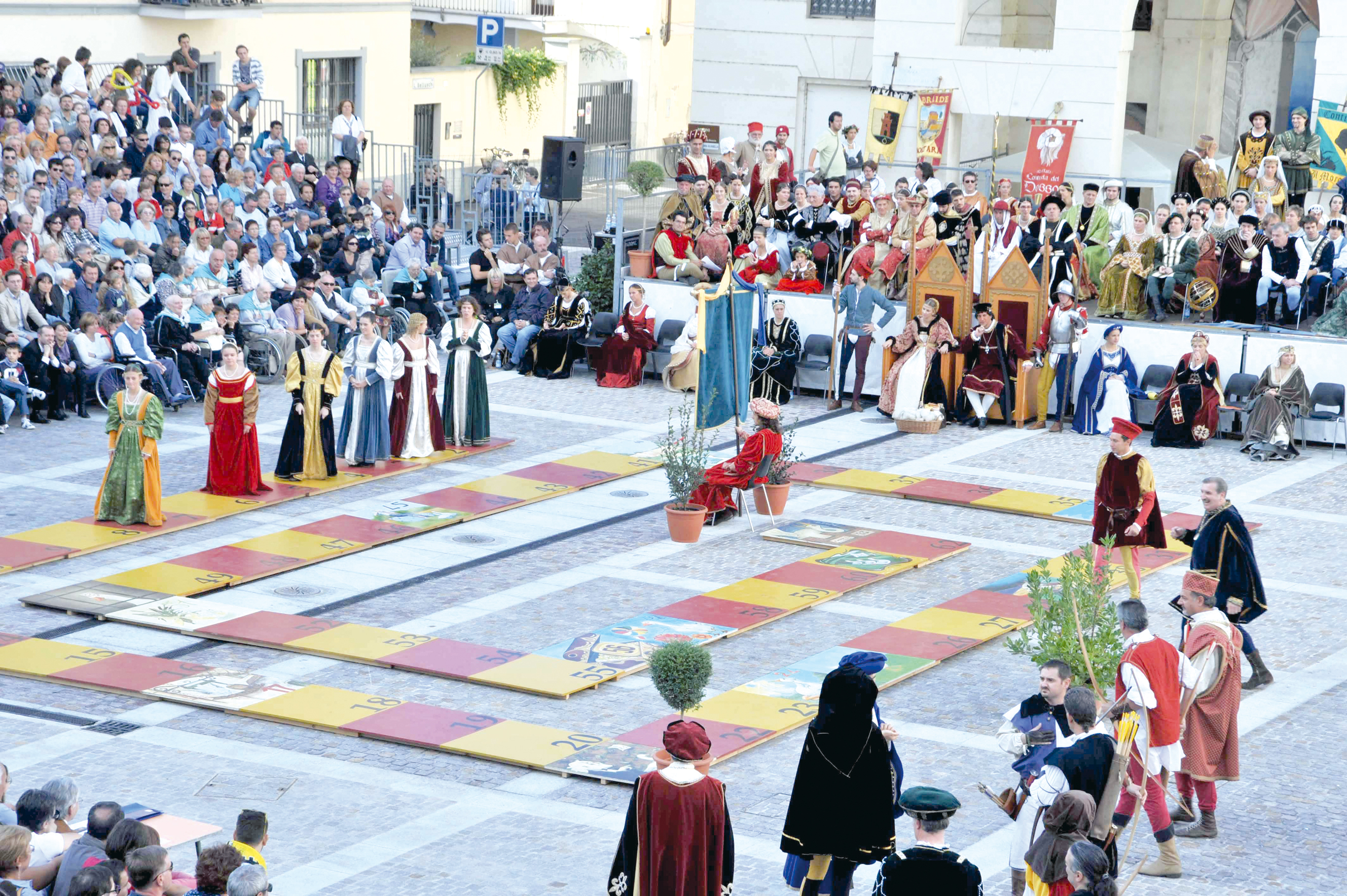 La piazza del Palio nel 2010